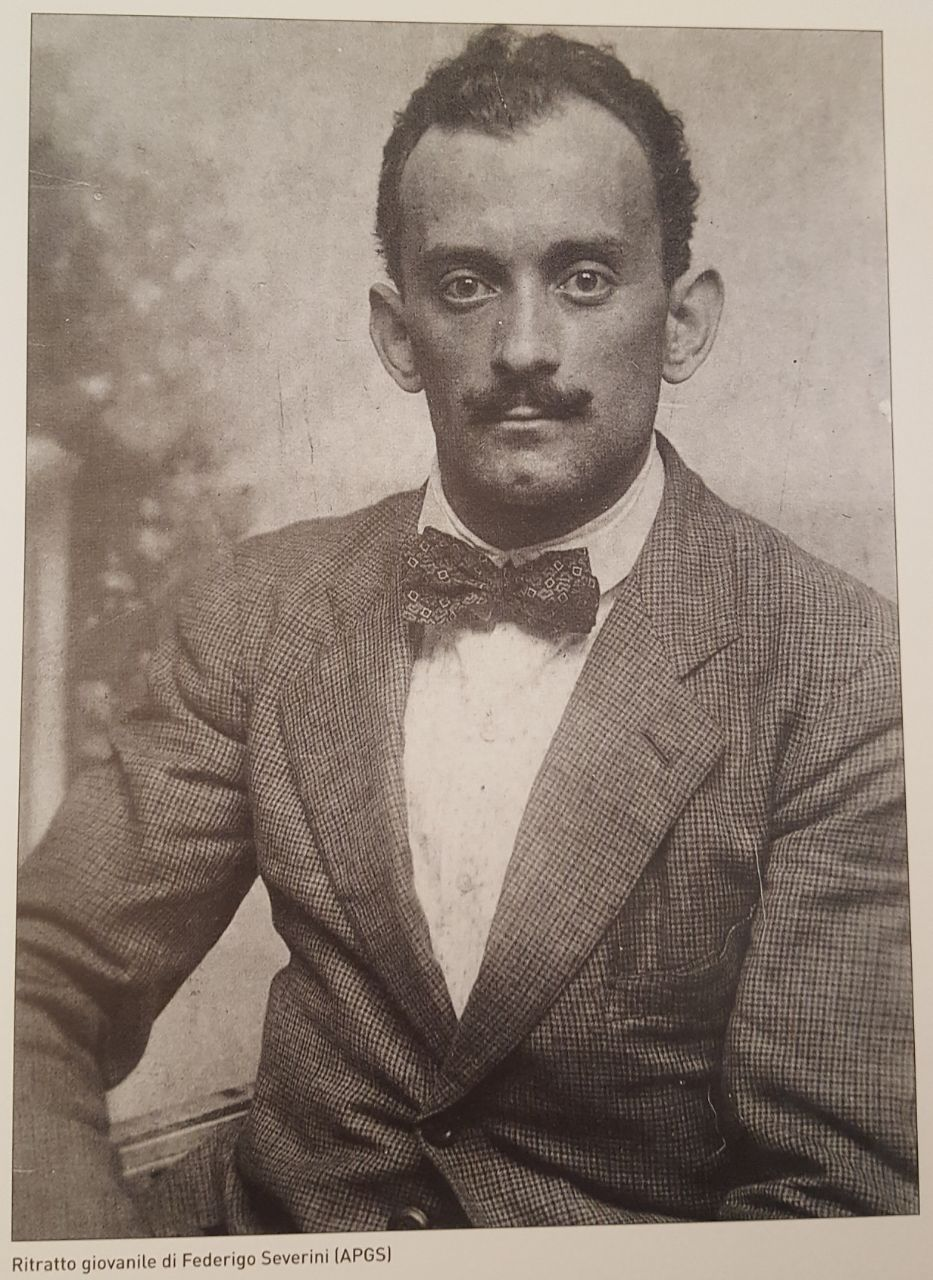 Ritratto giovanile di Federigo Severini